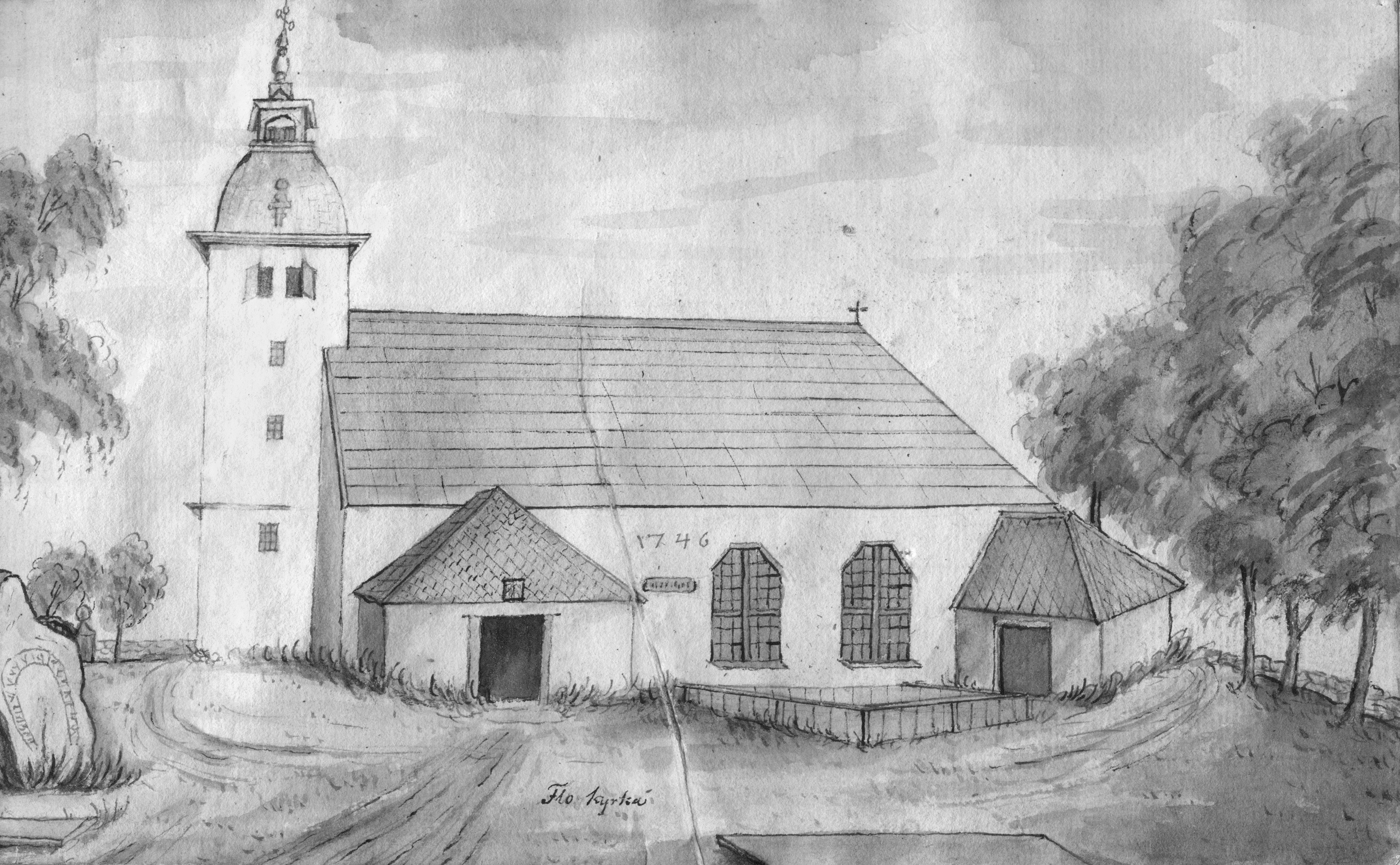 Laverad tuschteckning av Flo (gamla) kyrka, utan datering. Bilden visas i svartvitt på grund av svåra missfärgningar i pappret. Källa: Stifts- och landsbiblioteket i Skara: MS Geografi Västergötland 1, bild 49.